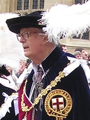 2006年6月19日